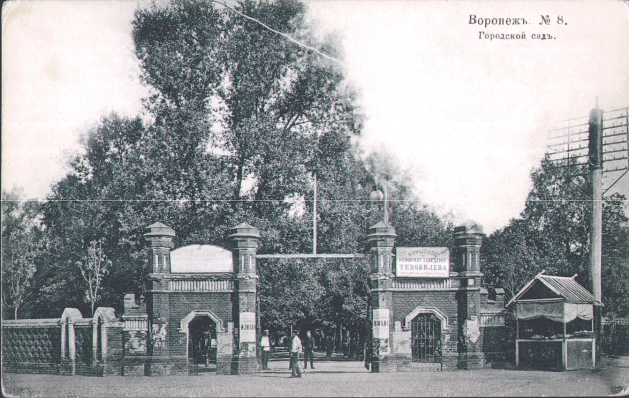 Городской сад